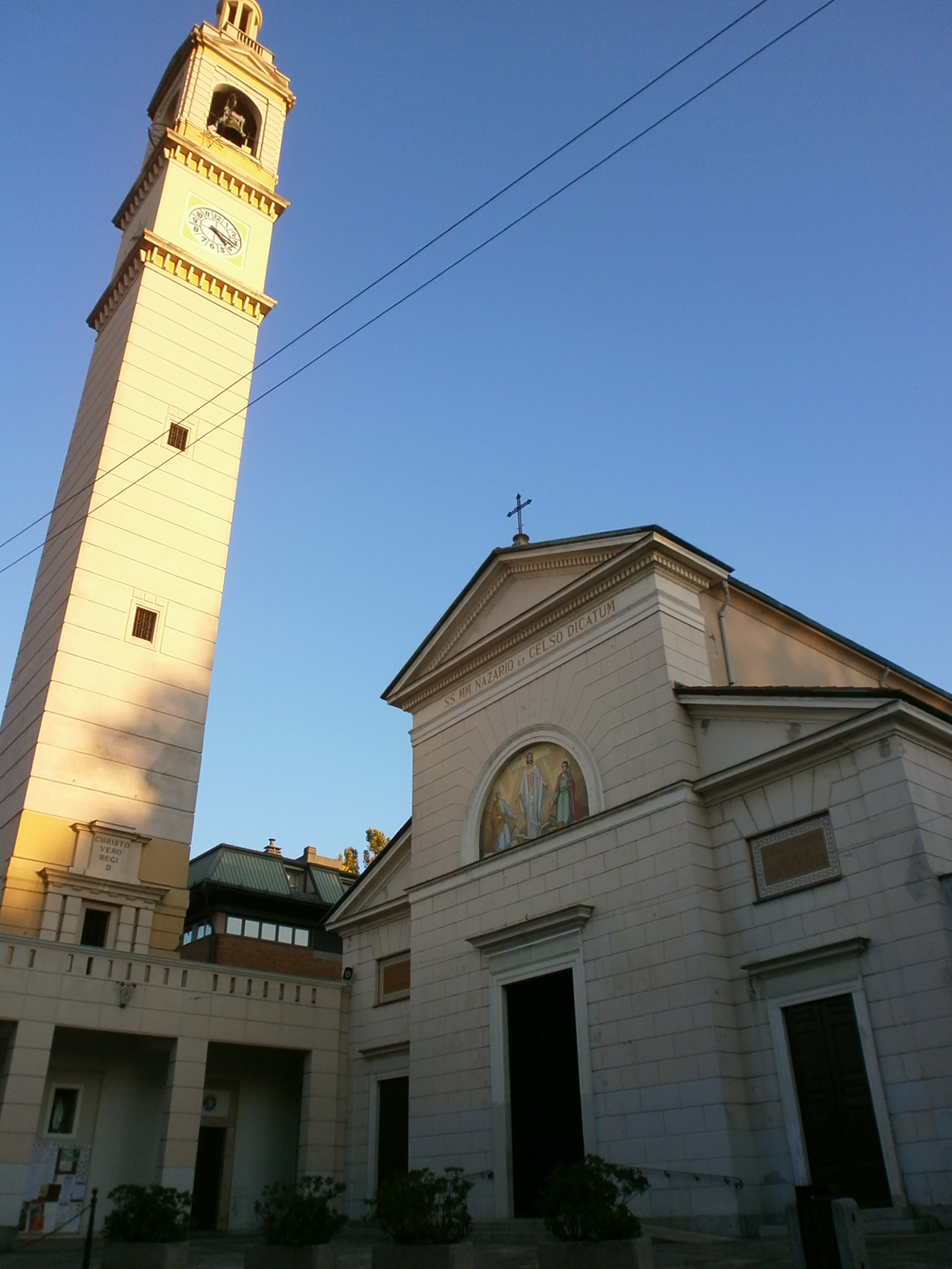 Paderno Dugnano - frazione di Dugnano - chiesa dei Santi Nazario e Celso